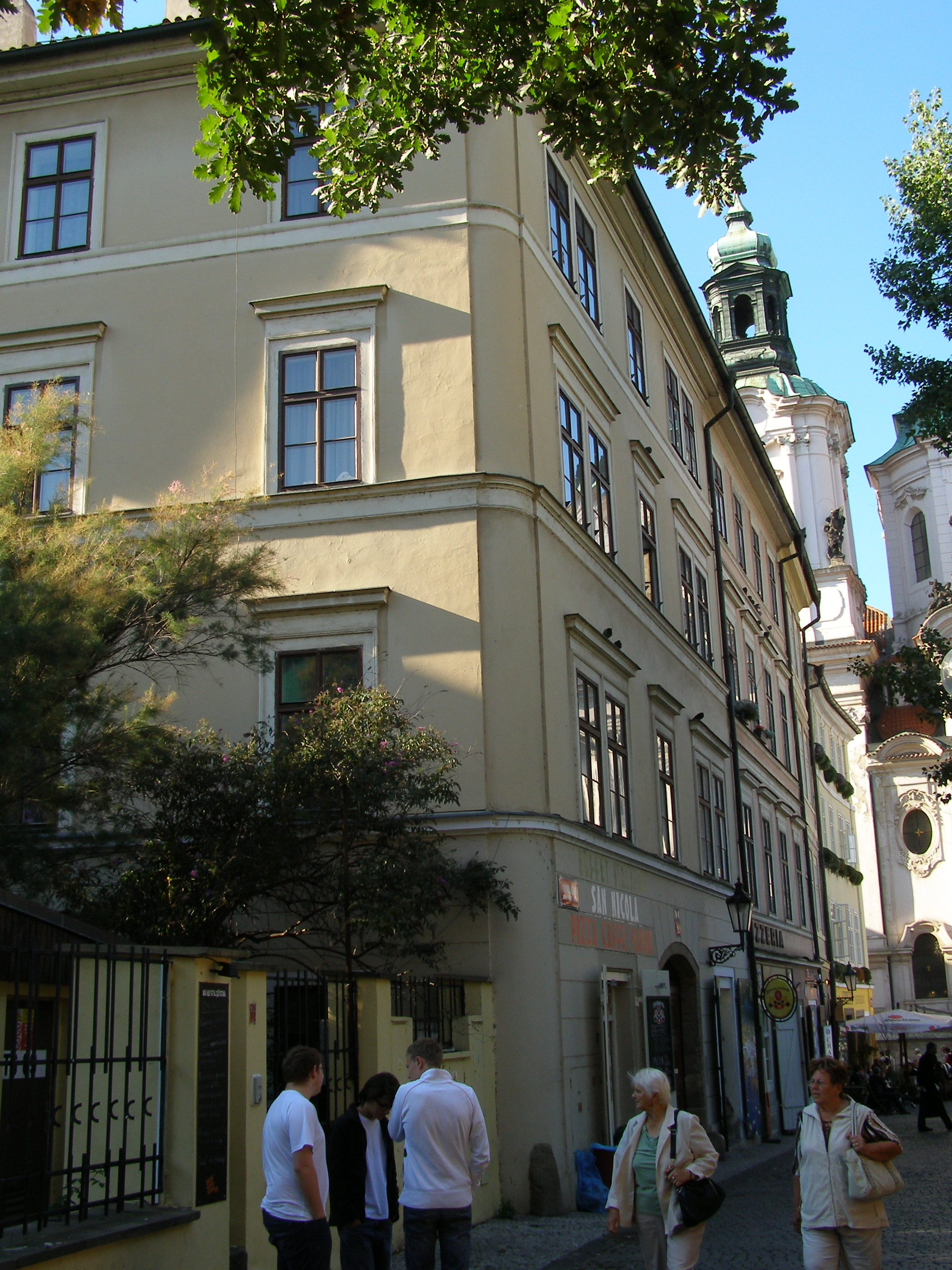 Měšťanský dům U zlaté husy (Staré Město), Praha 1, Mikulášská 22/8, Staré Město